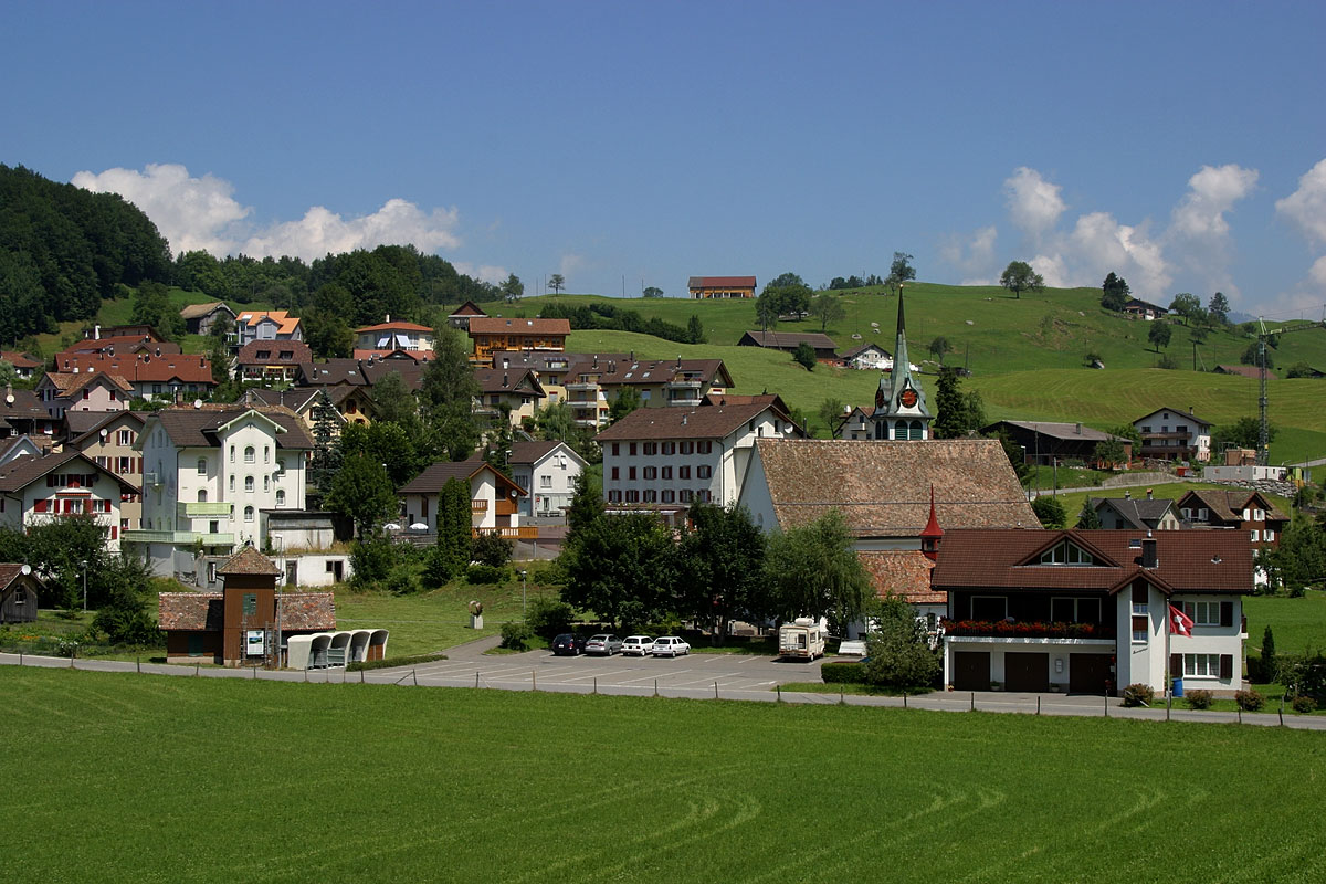 Morschach